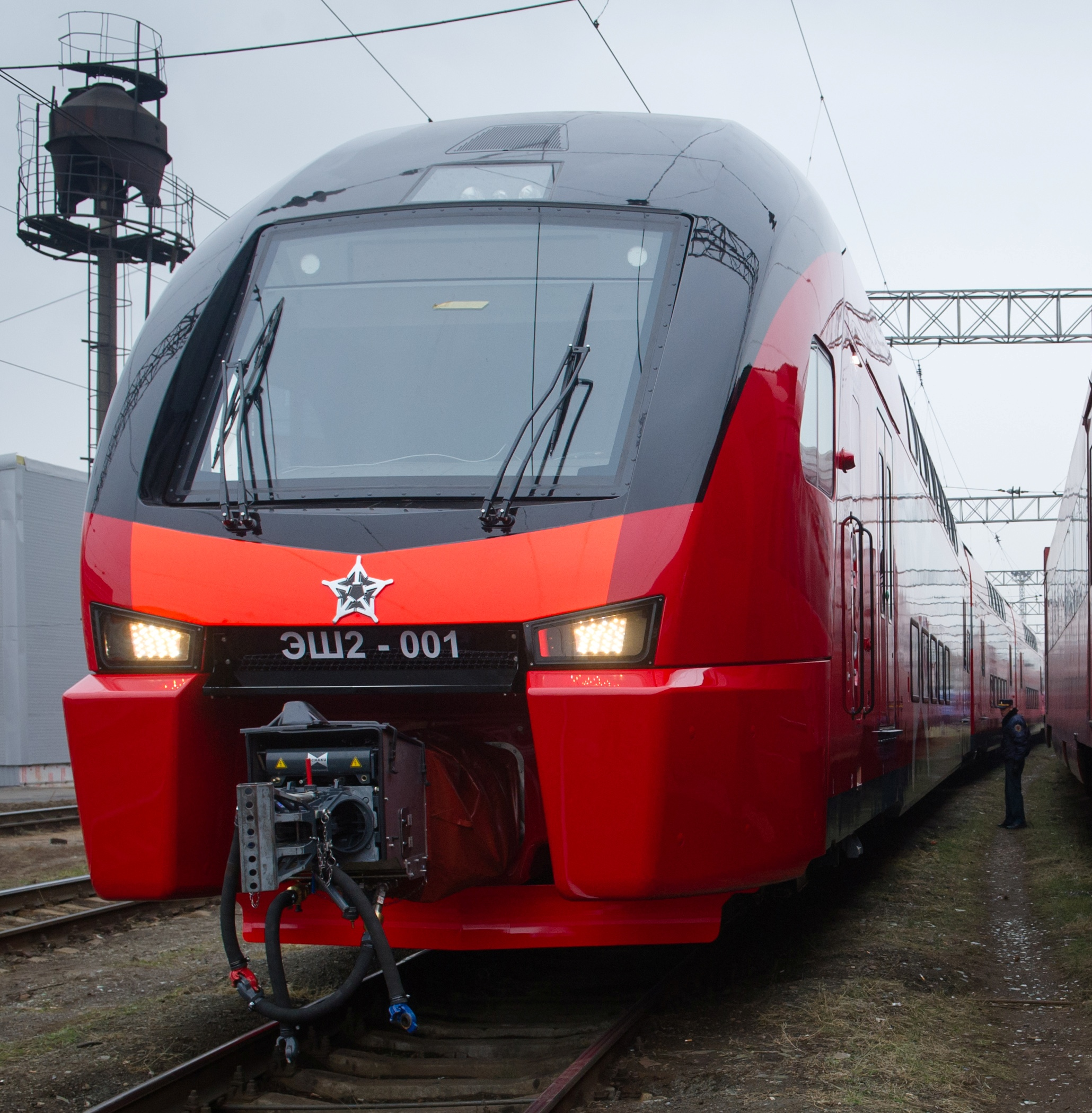 Электропоезд ЭШ2-001 на путях станции Москва-Пассажирская-Смоленская (Белорусский вокзал)